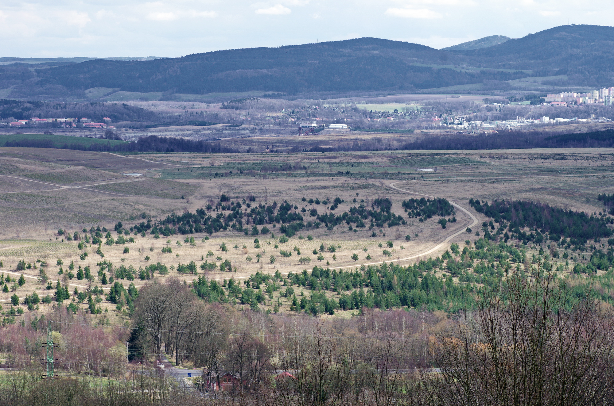 Sokolovská pánev, pohled ze svahů Krušných hor u obce Boučí, v pozadí Slavkovský les, okres Sokolov